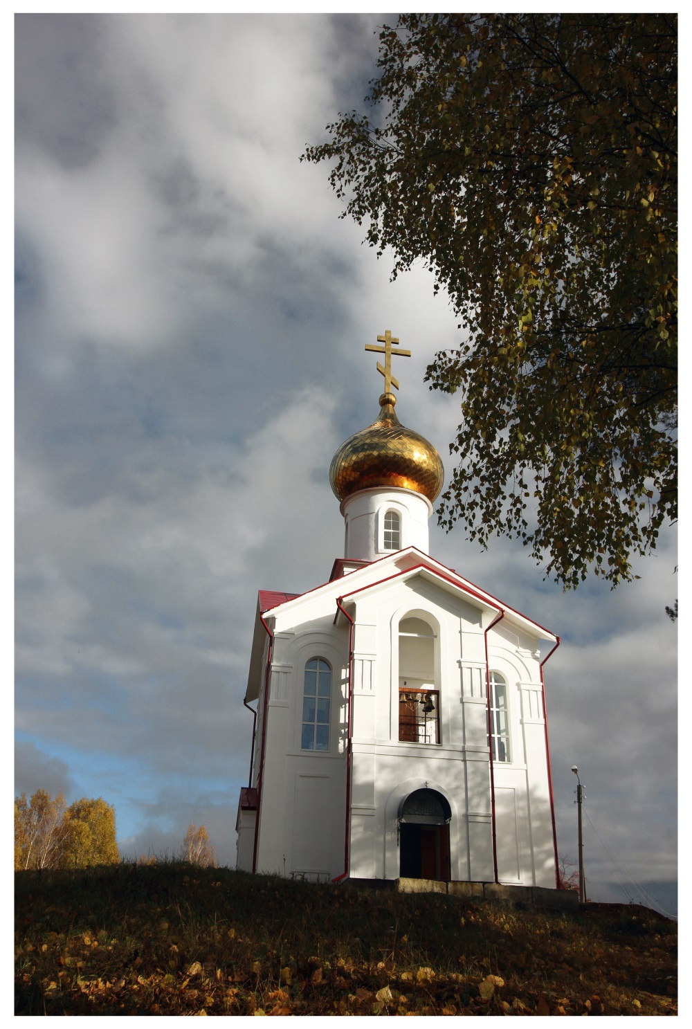 Церковь Владимира равноапостольного. Свердловская обл., пос. Монетный, ул. Сосновая, 4